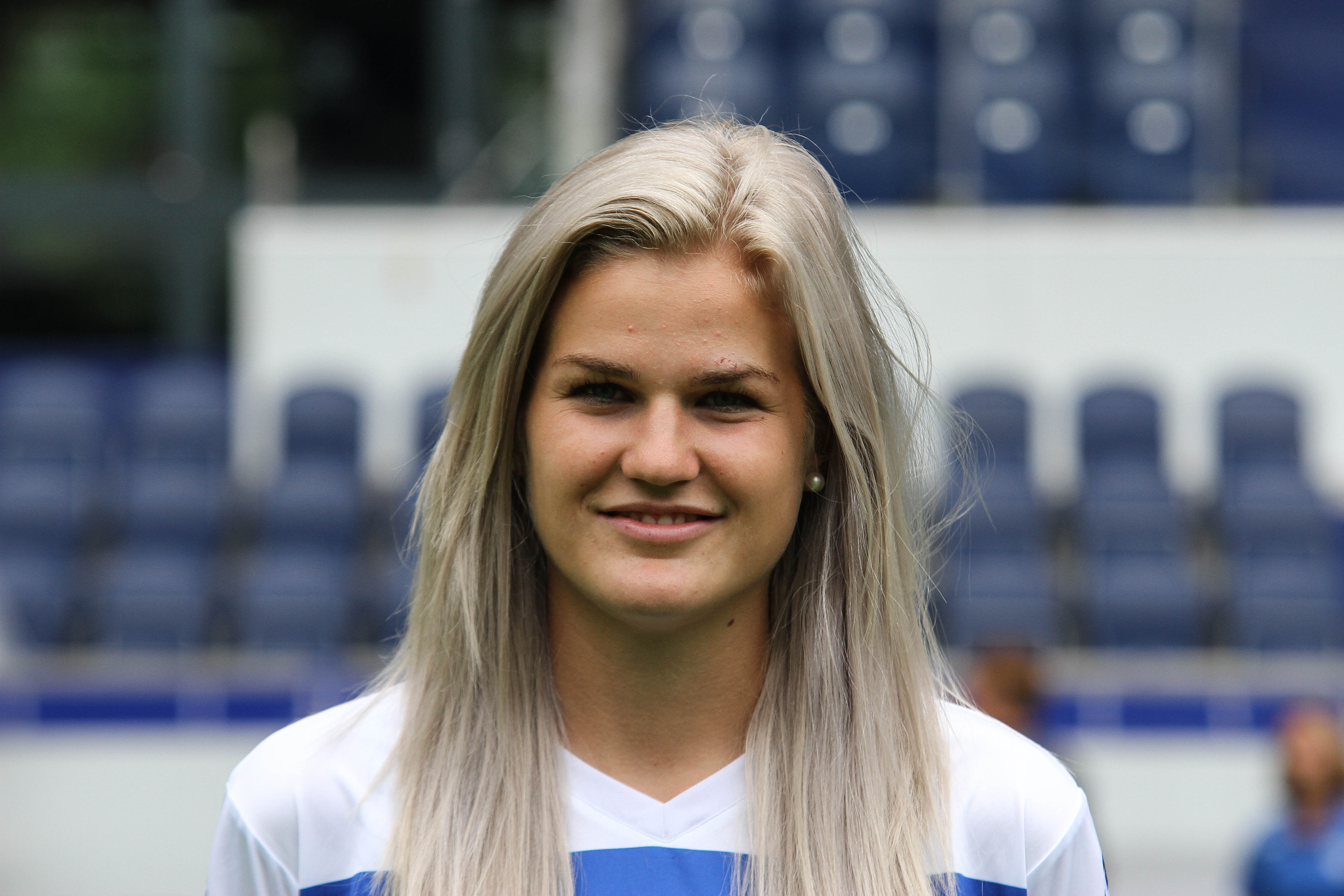 Rahel Kiwic (2014)